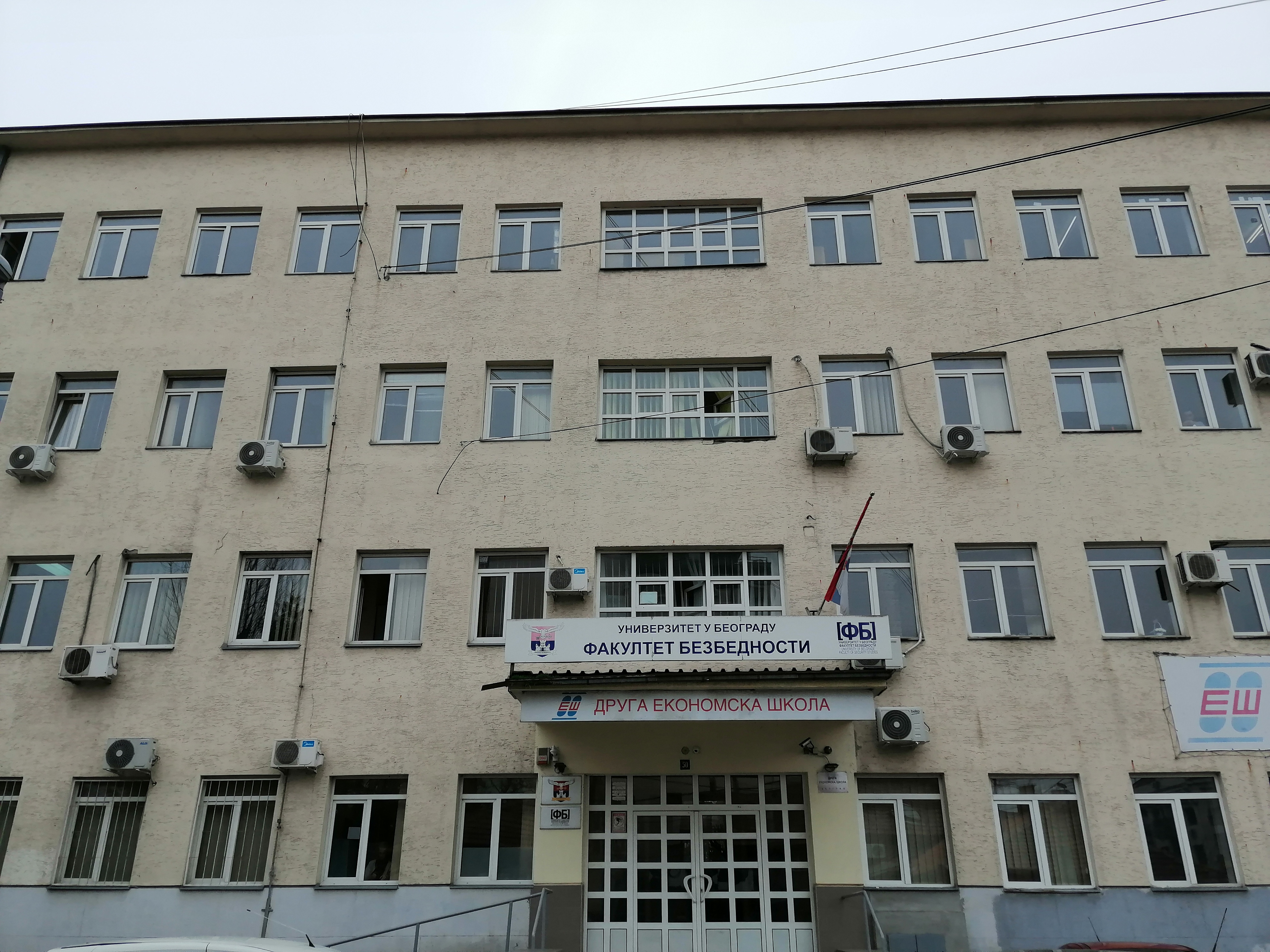 Srpski (latinica): Fakultet bezbednosti Univerziteta u Beogradu